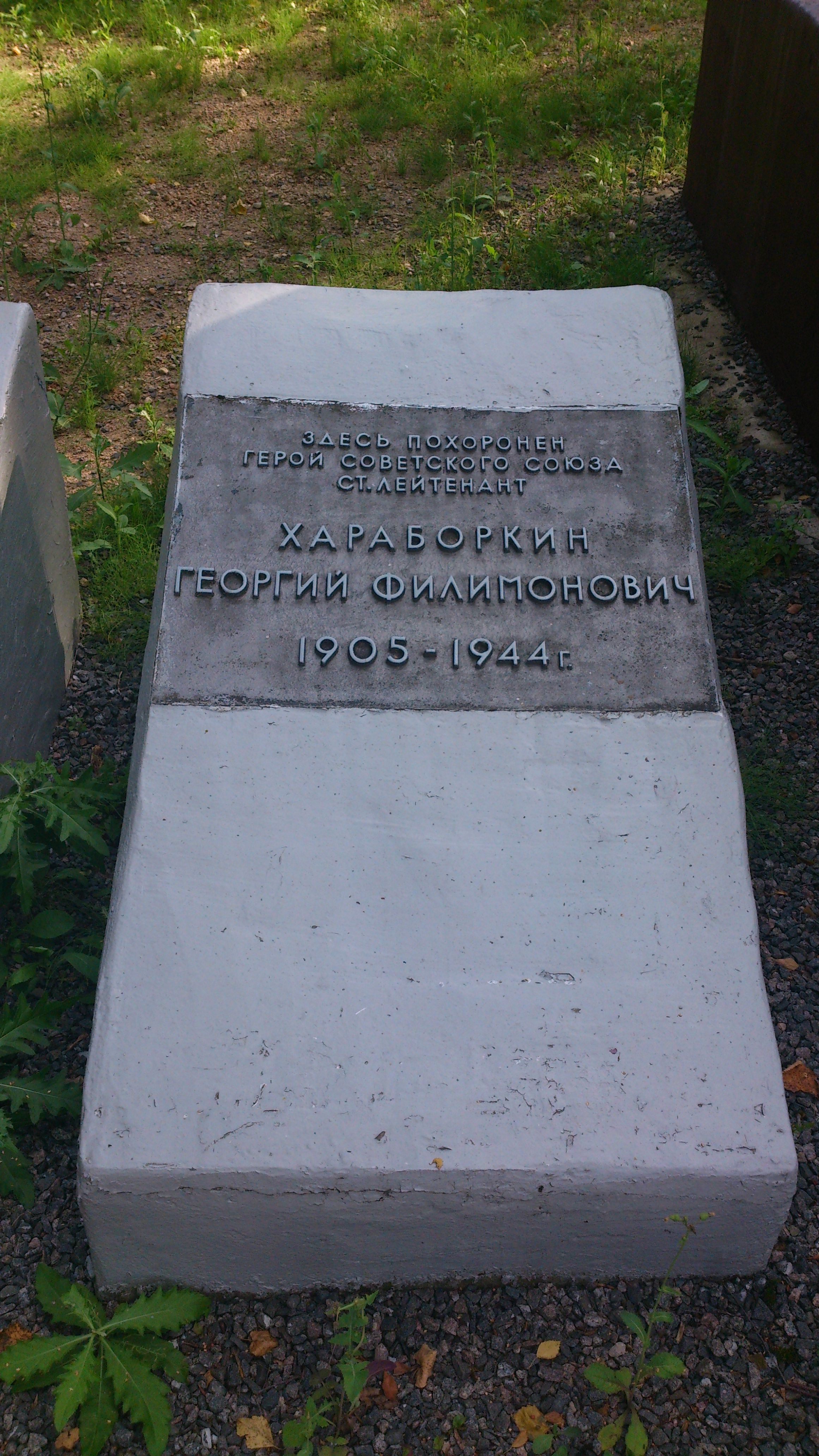 Надмогильная плита Герою Советского Союза Хараборкину Г.Ф. на братской могиле в Бешенковичах